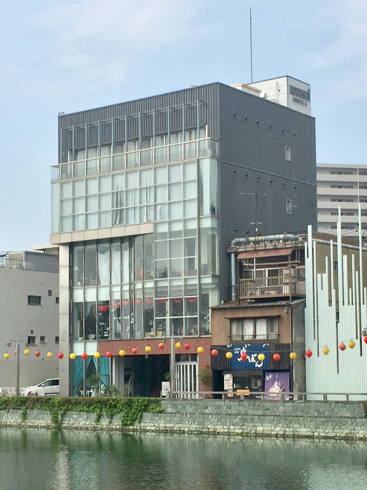 しんまちボードウォーク沿いにある国際東船場113ビル新館の外観。